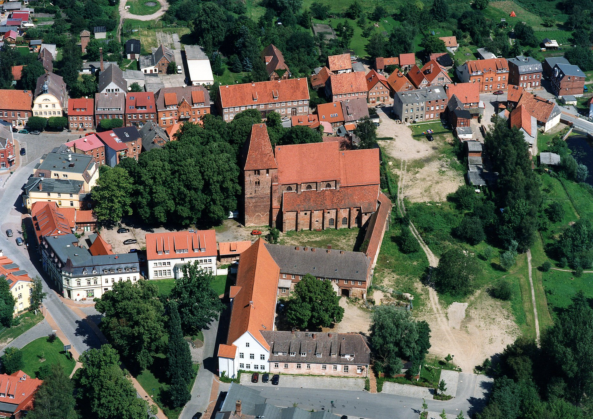 Beschreibung: Luftaufnahme vom Rehnaer Kloster im Jahr 2006 (oder früher) Autor: Volker Jödicke Quelle: Stadt Rehna